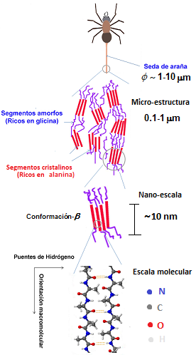 Estructura de la seda de araña: Desde la fibra hasta la estrcutura molecular